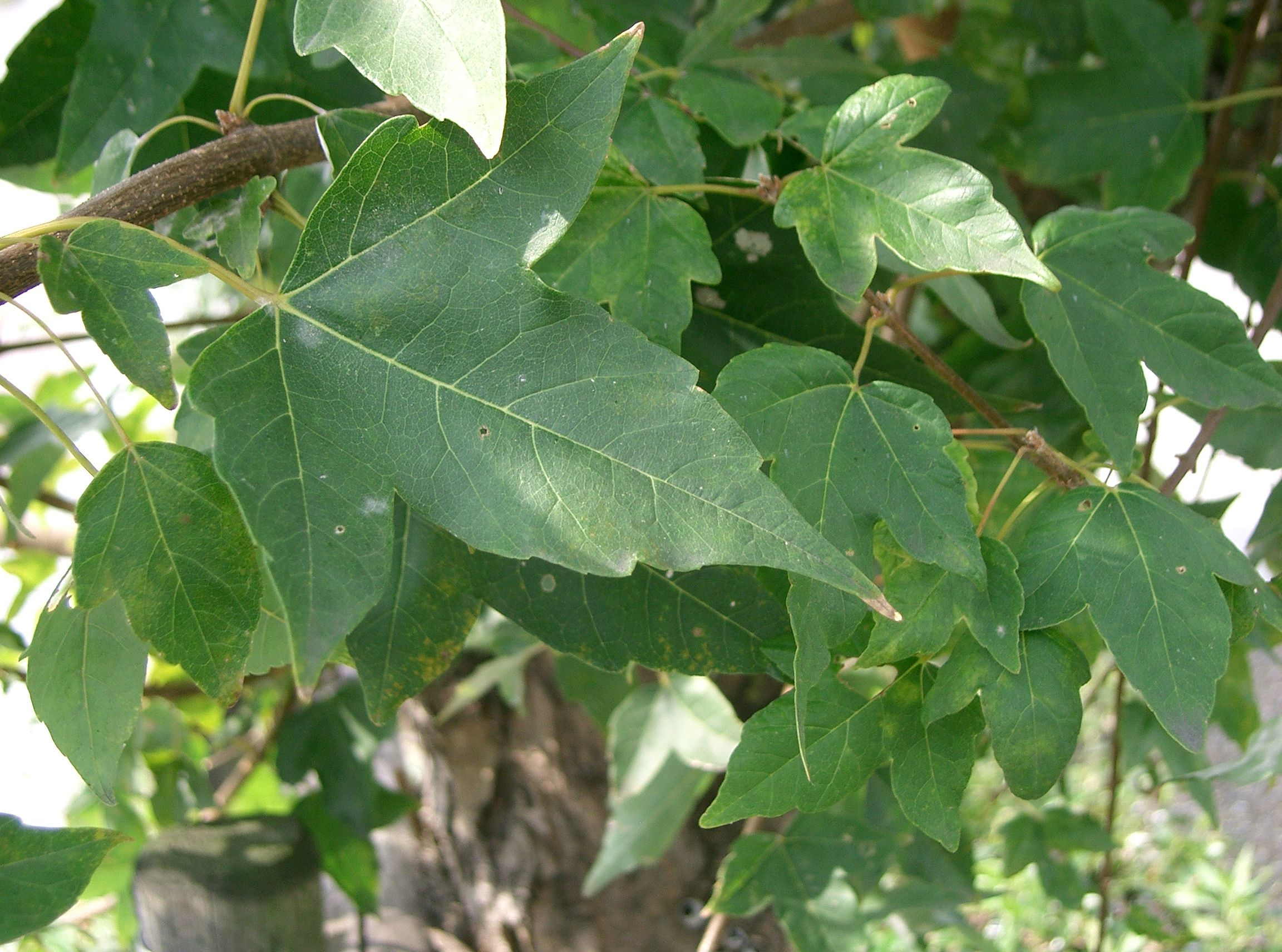 Acer buergerianum